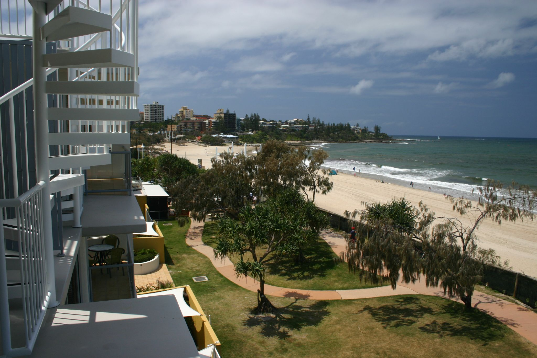 King's Beach, une célèbre palge de Caloundra